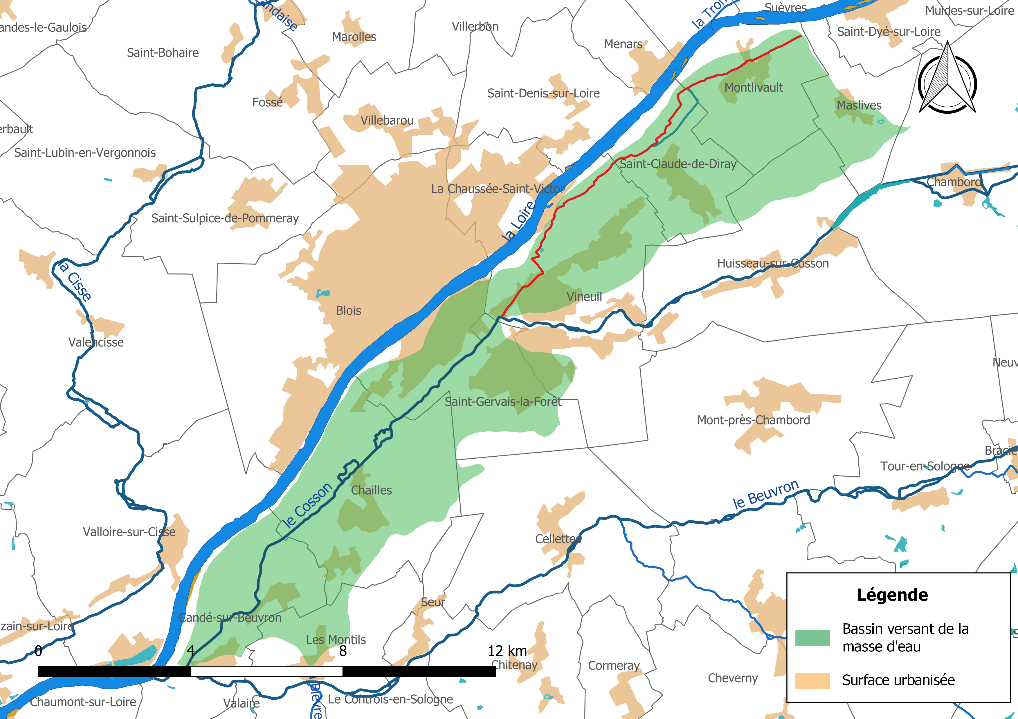 Carte de la masse d'eau FRGR0309b « le Cosson » et de son bassin versant